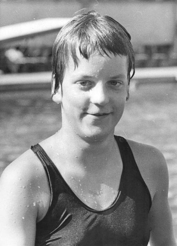 Ingrid Schmidt Zentralbild 24.10.1963 Deutsche Schwimm-Meisterschaften in Magdeburg Vom 21. bis 24.10.1963 werden in der Elbe-Schwimmhalle in Magdeburg die Deutschen Schwimm-Meisterschaften ausgetragen. UBz: Im einzigen Frauenwettbewerb am 23.10.1963 holte sich Ingrid Schmidt (Einheit Greiz) nach ihrem Sieg über 200-m-Rücken auch den Titel auf der 100-m-Strecke. In der Siegerzeit von 1:10,9 min. blieb sie genau 1. Sek über ihrem deutschen Rekord.